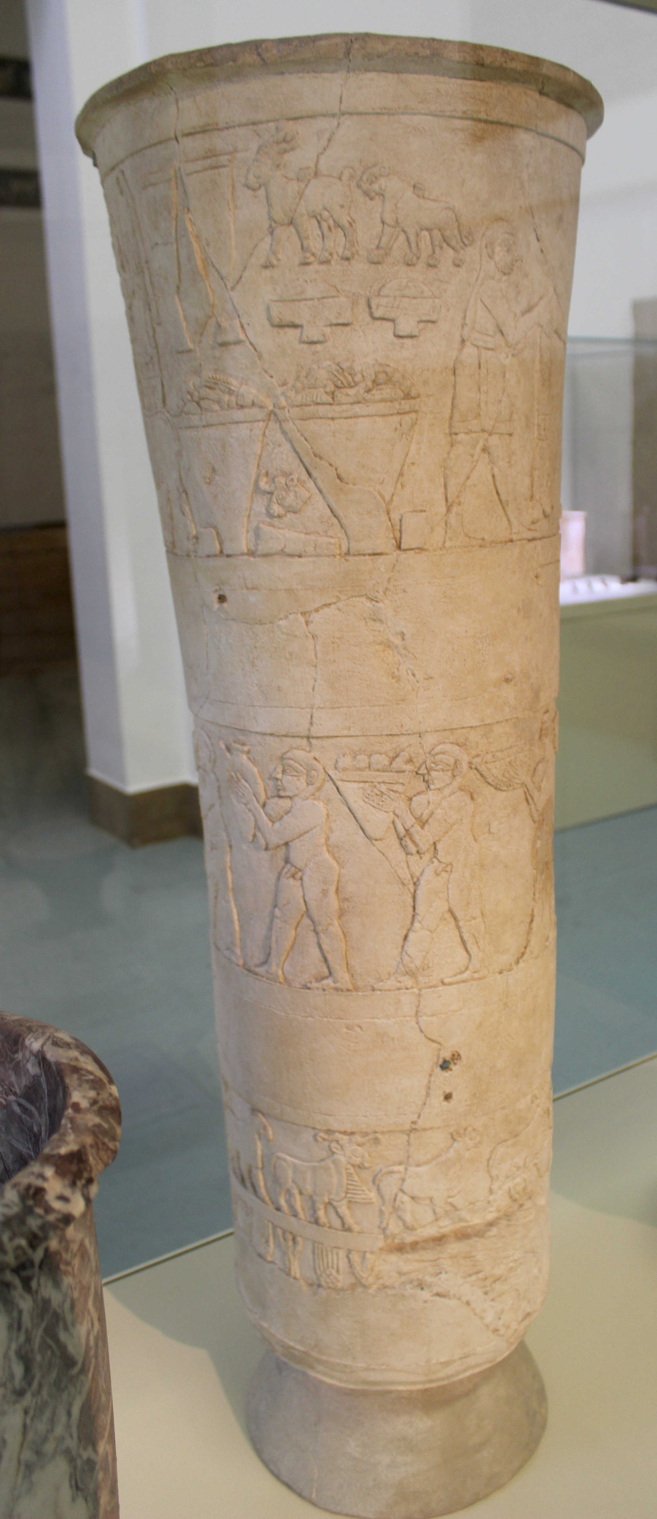 Berlín. Pergamon Museum. Vaso de caliza del templo de Eanna.